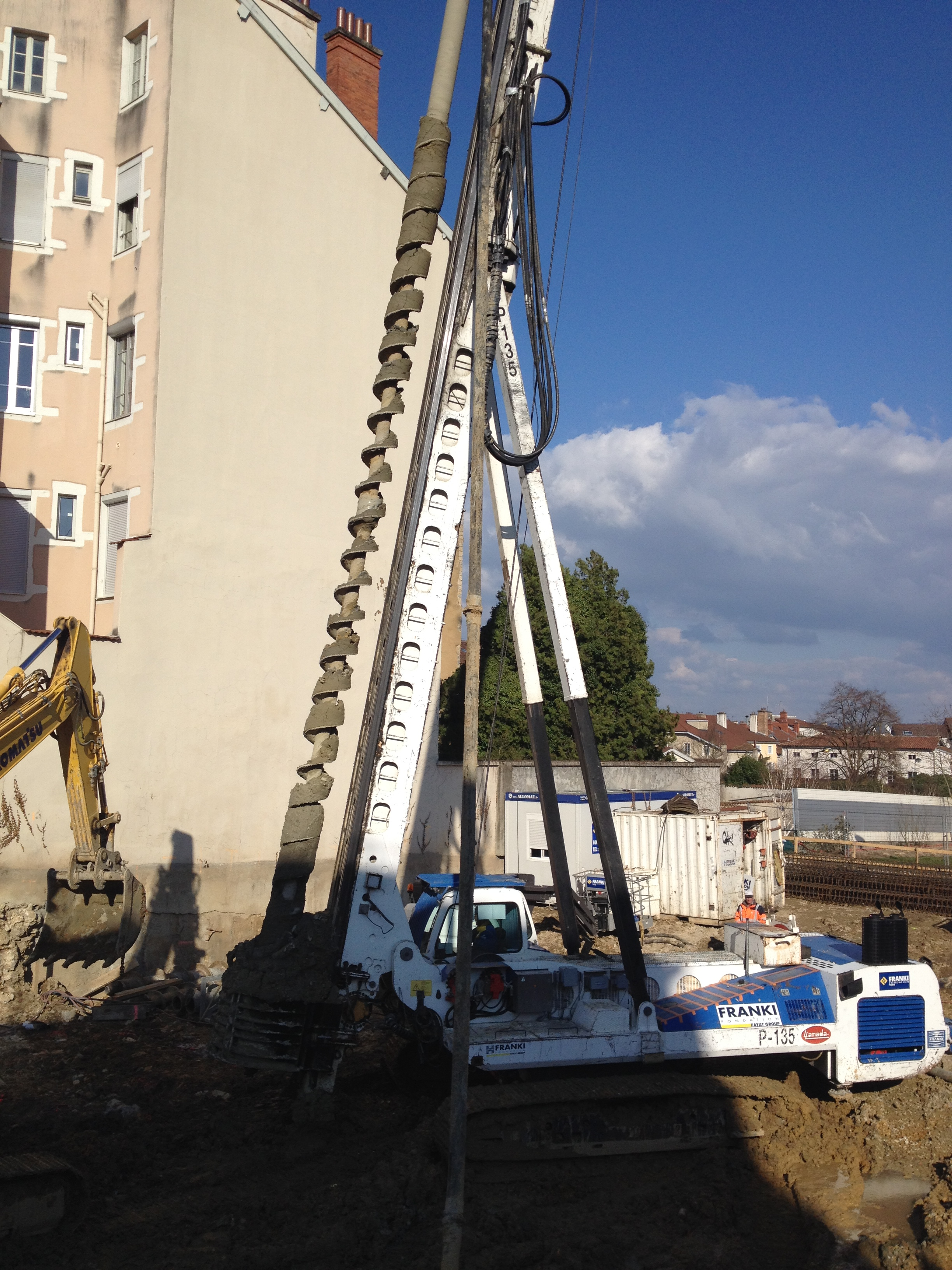 Machine à pieux en poste lors d'un chantier de fondation spéciale. Réalisation de pieux à la tarière. Bourg-en-Bresse, mars 2014.